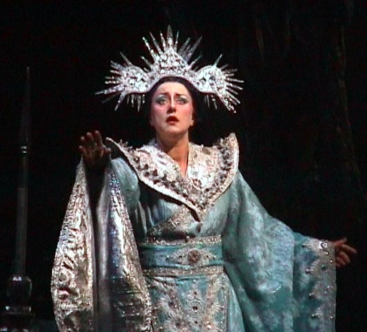 Gabriele Maria Ronge, Sopran